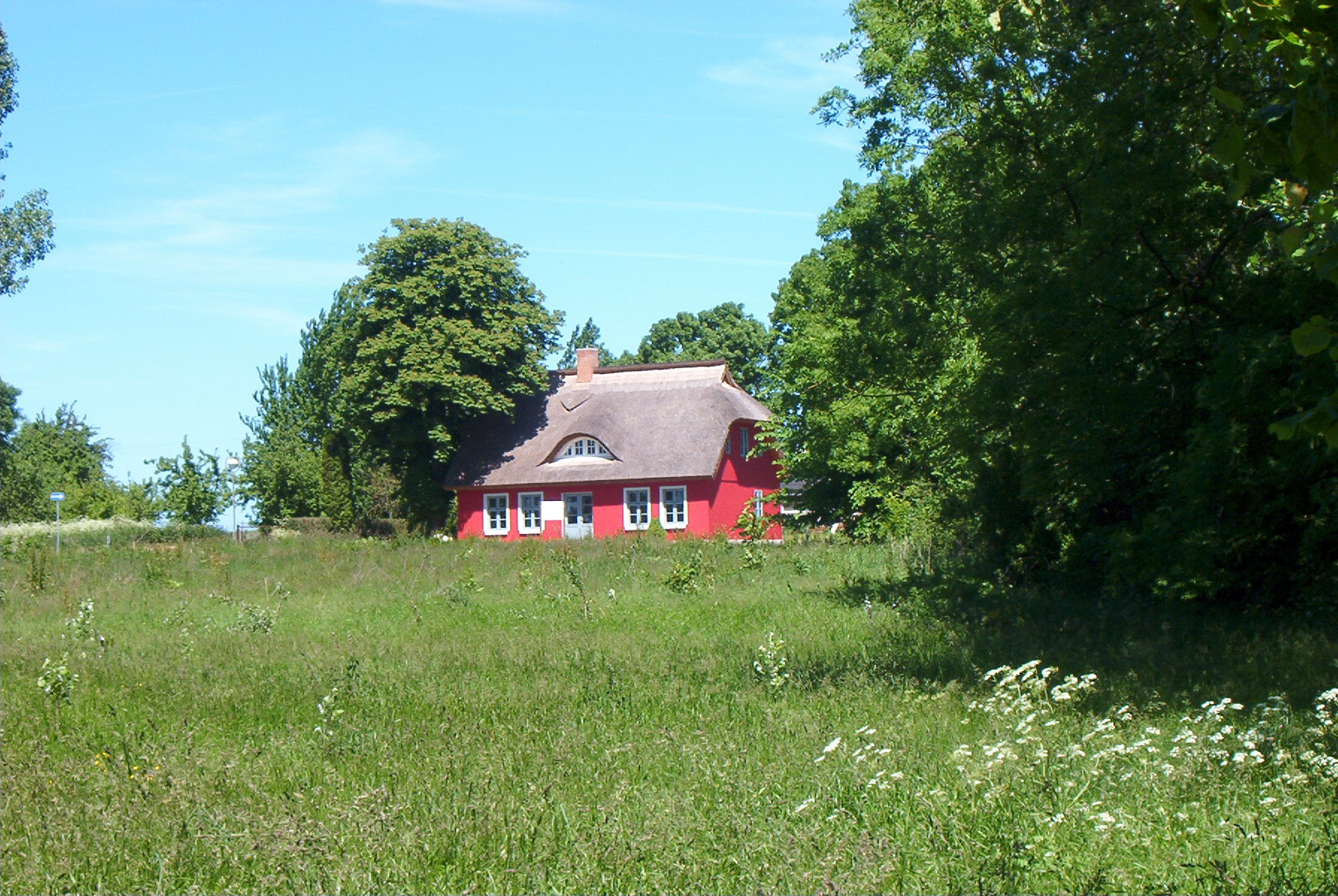 Putgarten, Gebäude am südlichen Ortseingang, aufgenommen am 18.6.2005 von Olaf Meister, erteilte Lizenz: GNU-FDL Kategorie:Bild:Gebäude